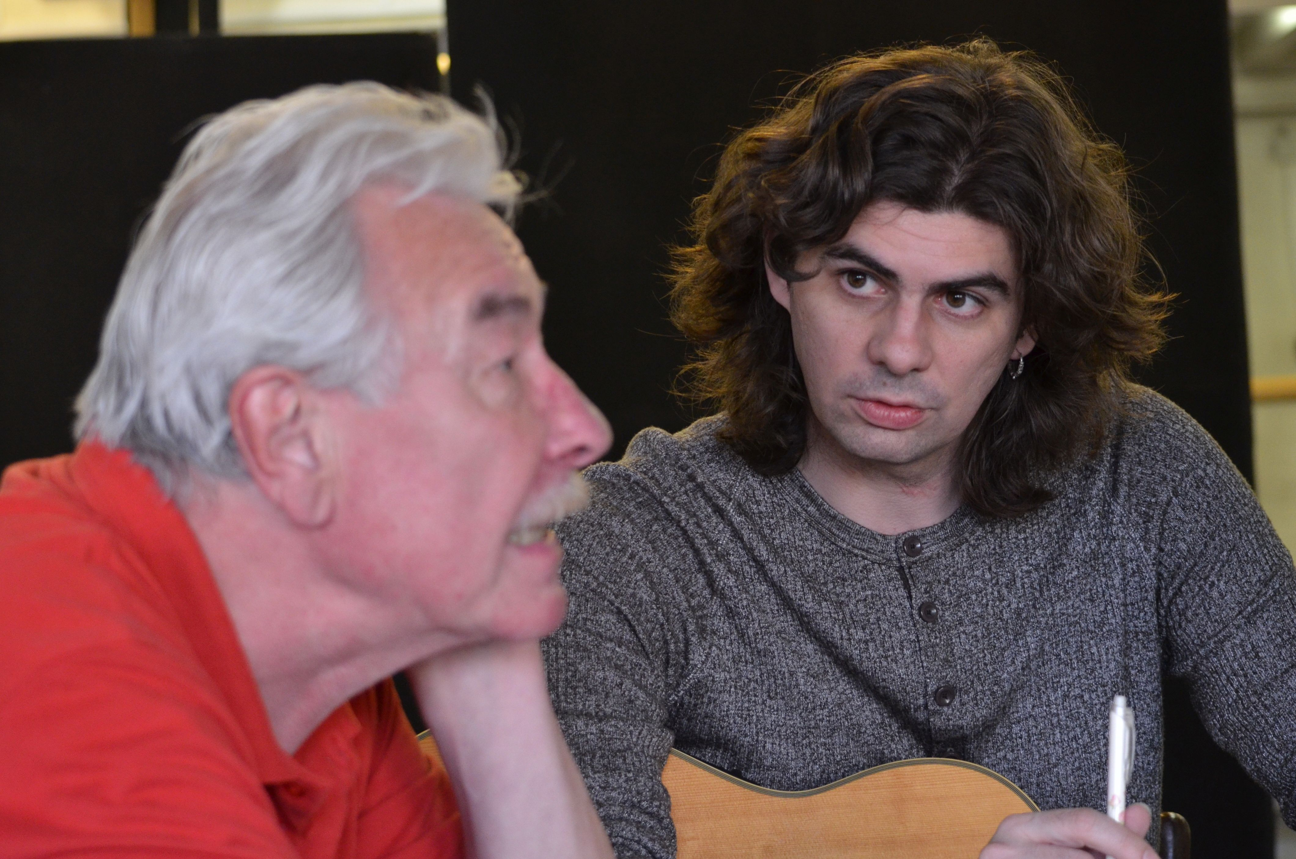 Katona János színművész (1949–2015) és Dóka Attila zenész 2014-ben